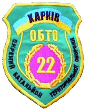 Нарукавний шеврон 22-го окремого батальйону територіальної оборони Збройних сил Українию.